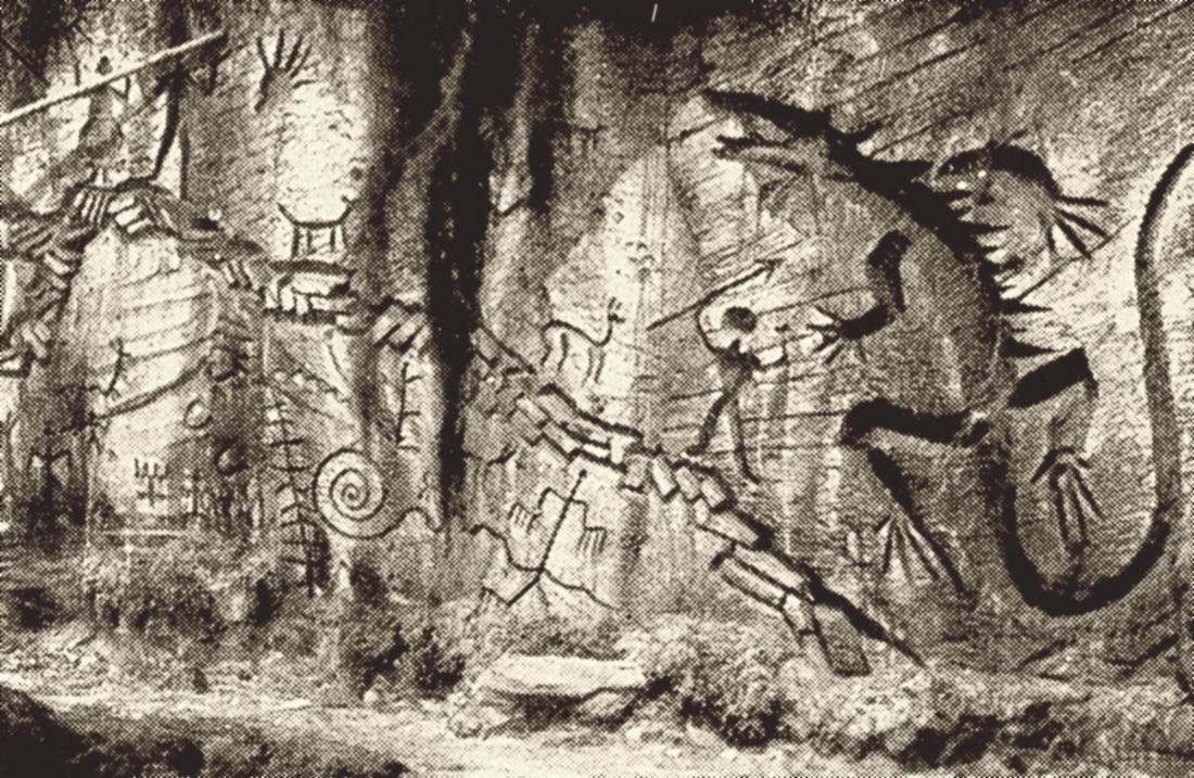 Cena do filme One Million B. C. (1940)